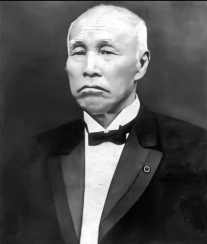 内閣総理大臣